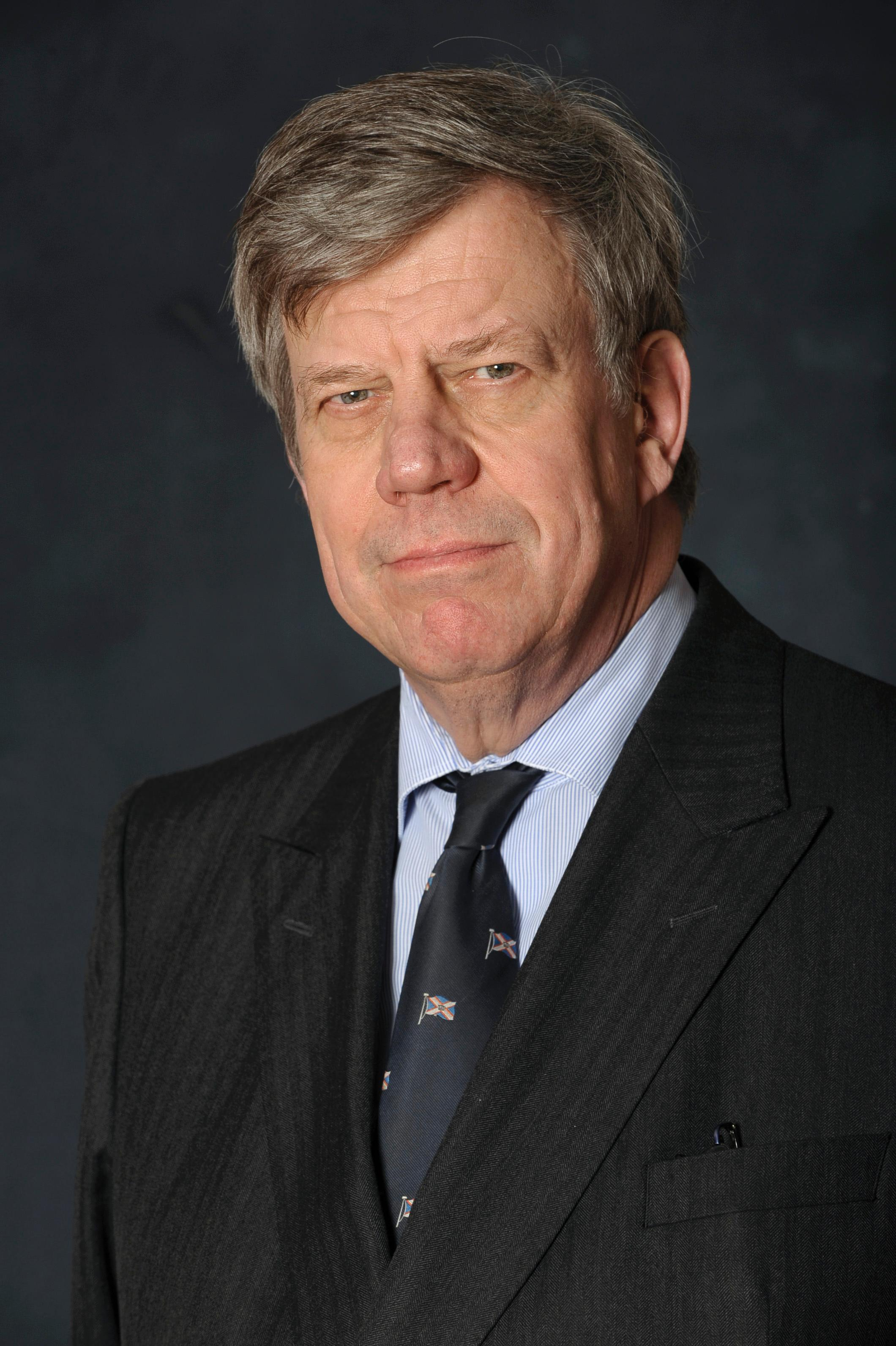 Minister van Veiligheid en Justitie Ivo Opstelten